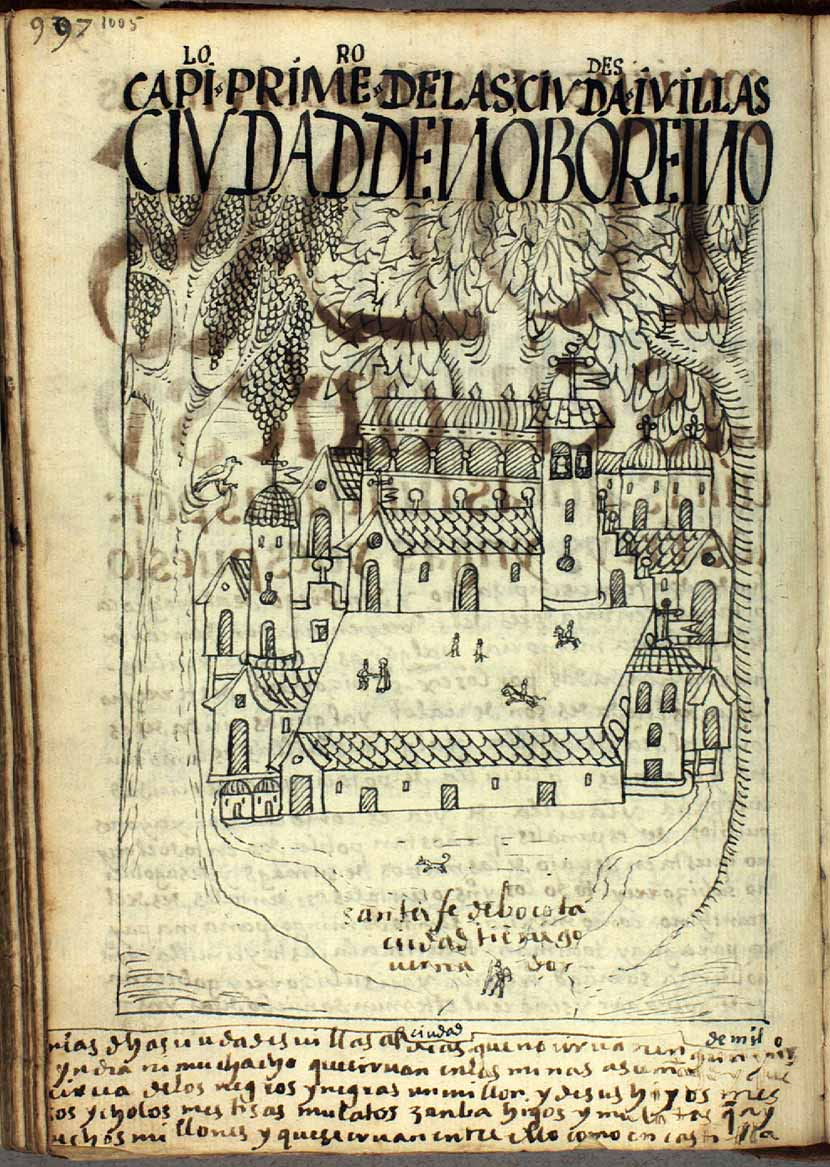 997 [1005] CAPÍ[TV]LO PRIMERO DE LAS CIVDADES I VILLAS: CIVDAD DE NOBO REINO / Santa Fe de Bocotá, ciudad tiene gouernador1 / ciudad / [E]n las dichas ciudades, uillas, aldeas que no cirua ningún yndio [ni] yndia ni muchacho que ciruan en las minas a su Magestad y que [...] cirua de los negros y negras un millón y de sus hijos mes[tizos] y cholos, mestisas, mulatos, zanbahígos y mulatas que ay [m]uchos millones y que se ciruan entre ello como en Castilla. 1 “Santa Fe de Bocotá, ciudad, tiene gouernador” completa la identificación de “Ciudad de Nobo Reino.” Véase la nota a la pagina siguiente.